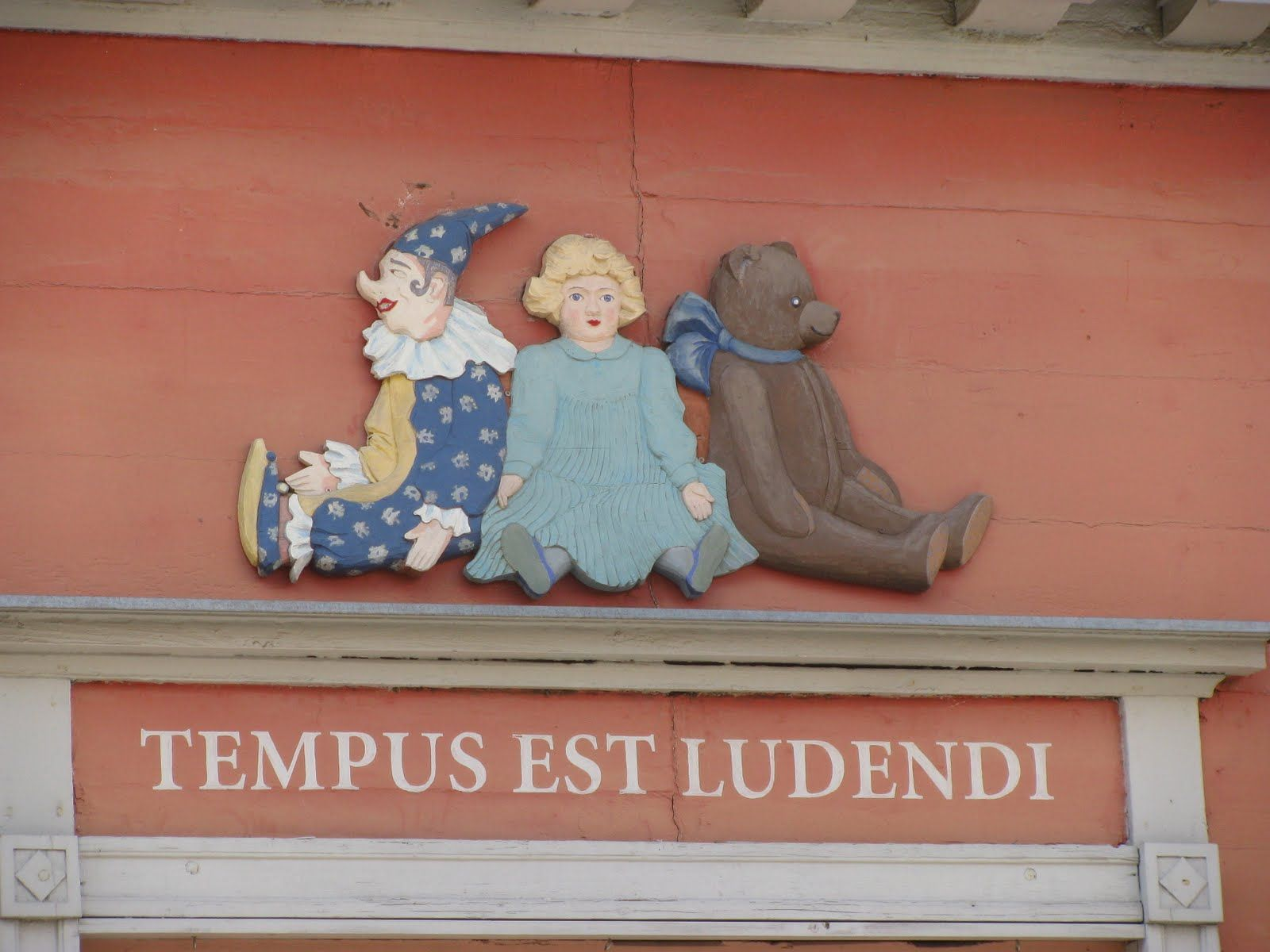 Moto Tartu mänguasjamuuseumi ukse kohal, Lutsu 8 Tartus, 20. september 2011.